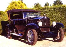 Citroen Rosalie, erster Diesel-Personenwagen